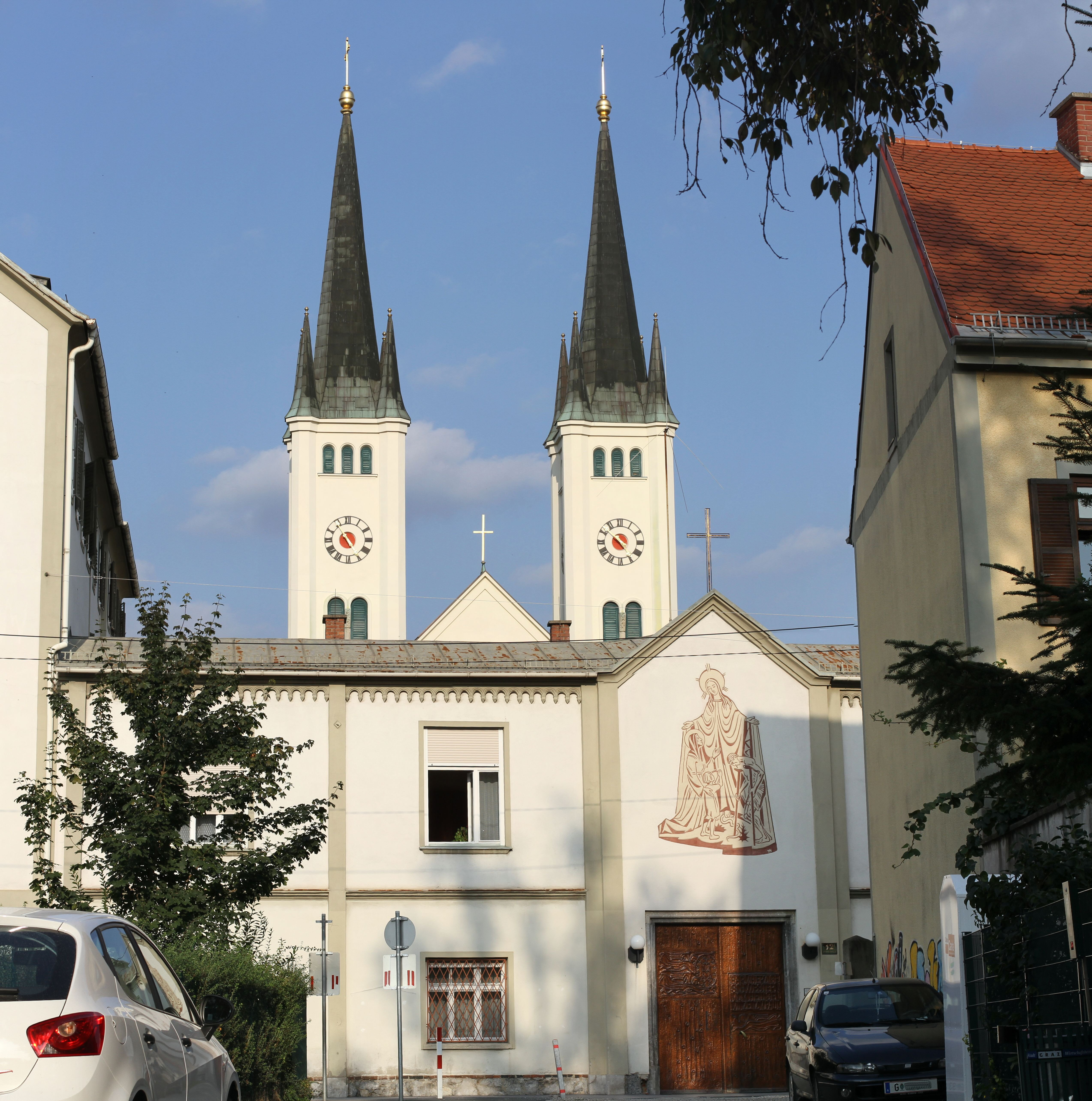 Klosterkirche der Barmherzigen Schwestern vom hl. Vinzenz von Paul, Mariengasse 12, Graz, Österreich